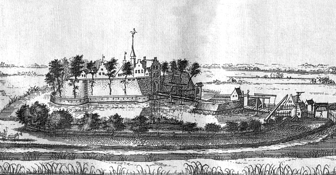 Festung Apen vermutlich im 17. Jahrhundert